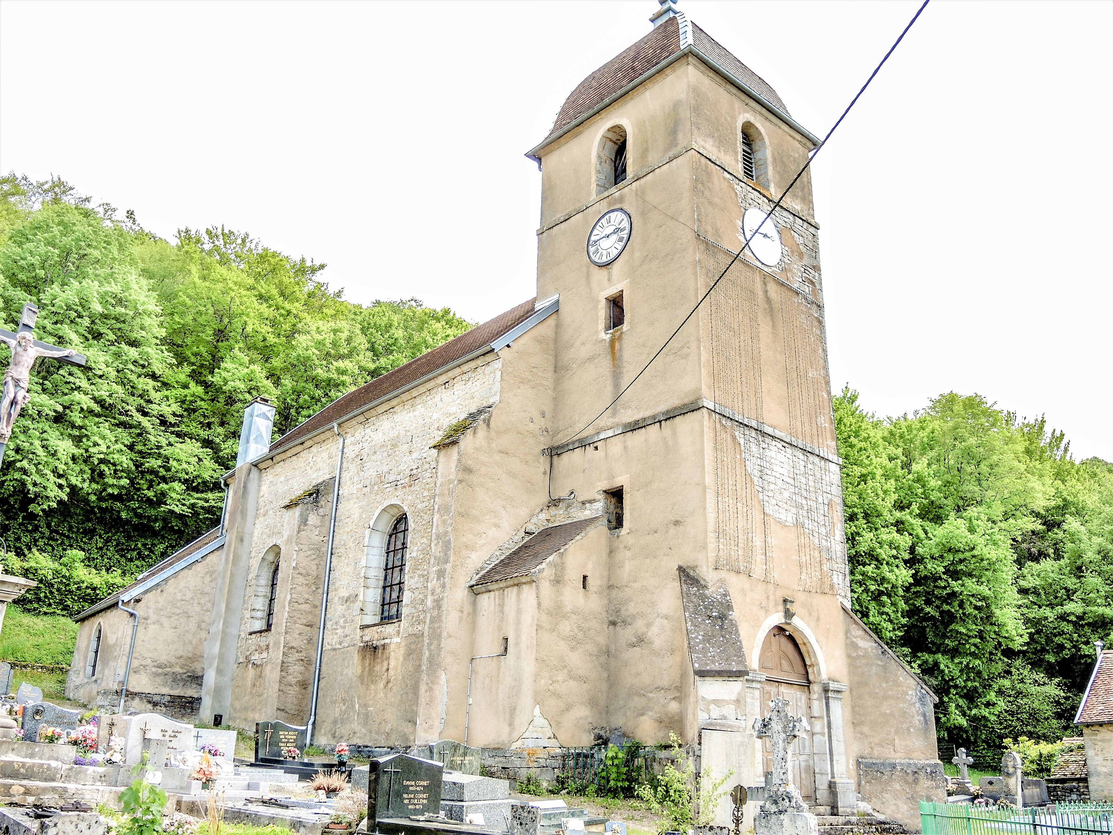 Eglise de Mondon